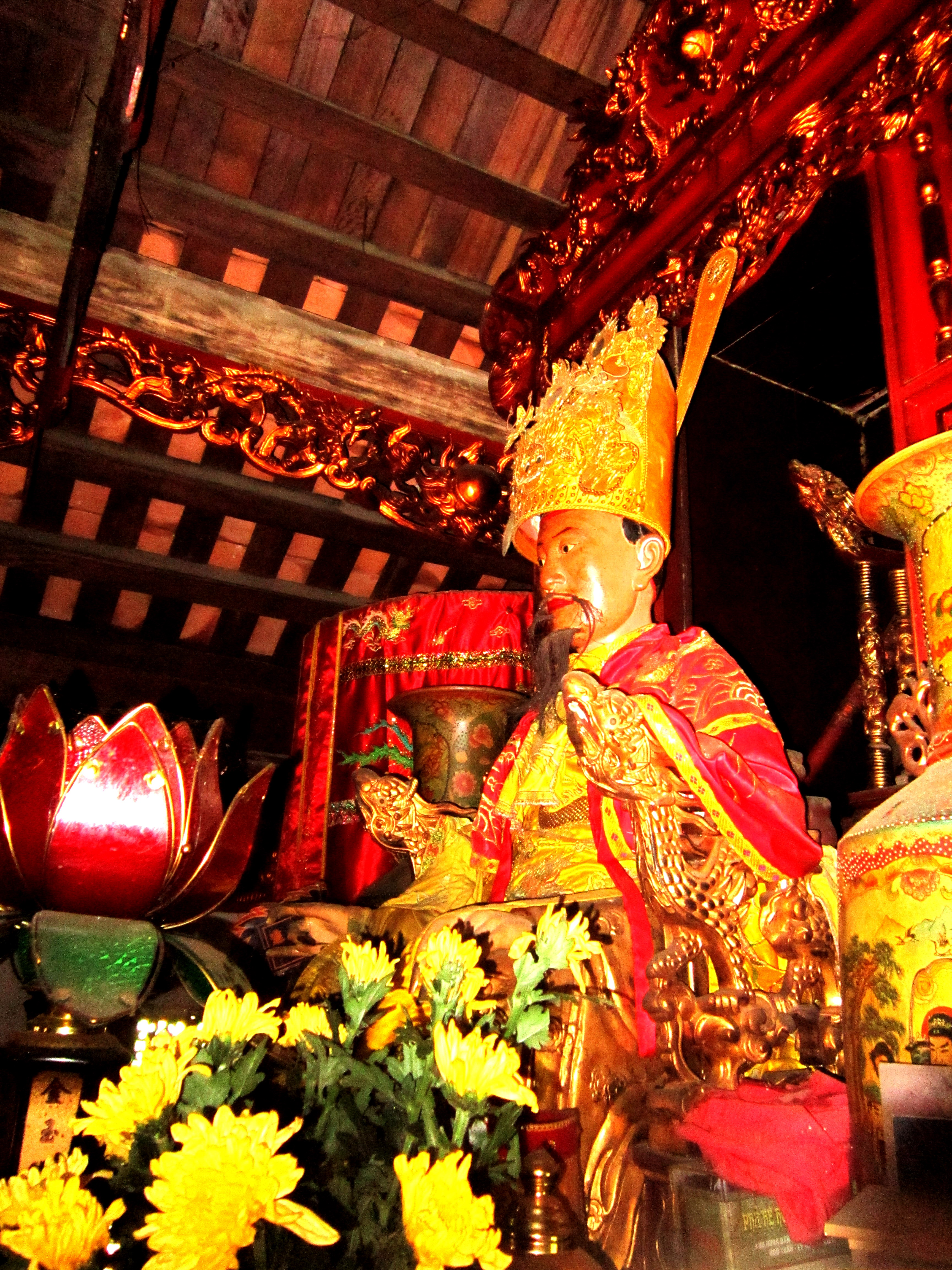 Volapük: Tượng Ngô Quyền (898 - 944, còn được biết đến với tên gọi Tiền Ngô Vương) trong đền thờ ông ở thôn Cam Lâm trong Làng cổ Đường Lâm, thuộc thị xã Sơn Tây (Hà Nội, Việt Nam)